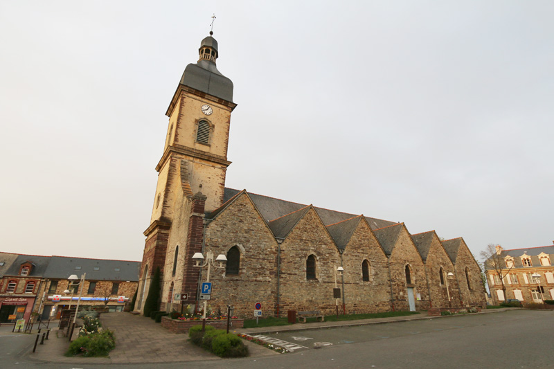 Eglise de Guichen